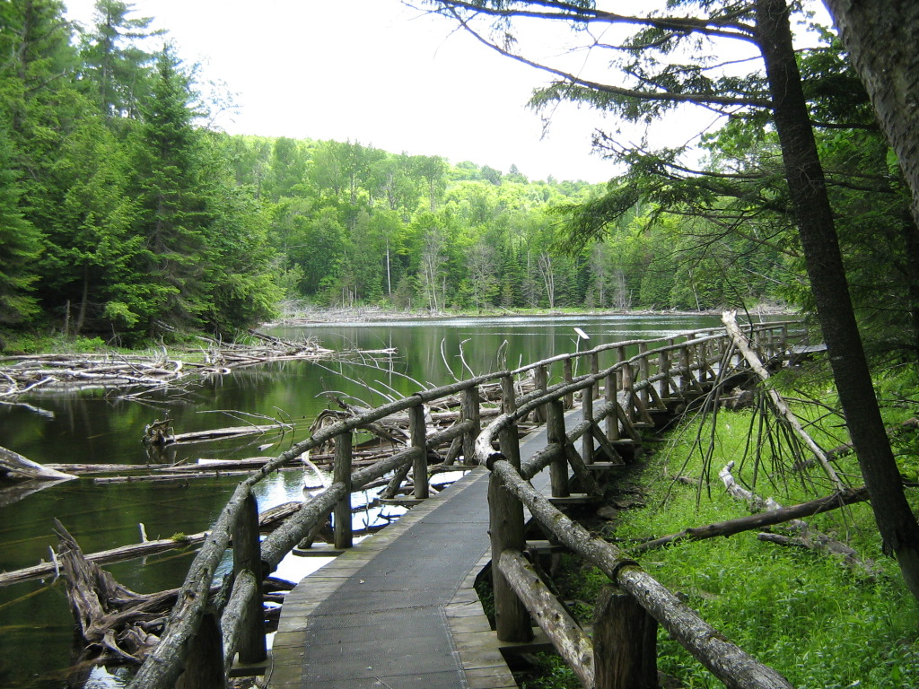 Photo de la passerelle du lac aux Hérons sur le sentier du Ouaouaron dans la réserve écologique de la Forêt-la-Blanche.